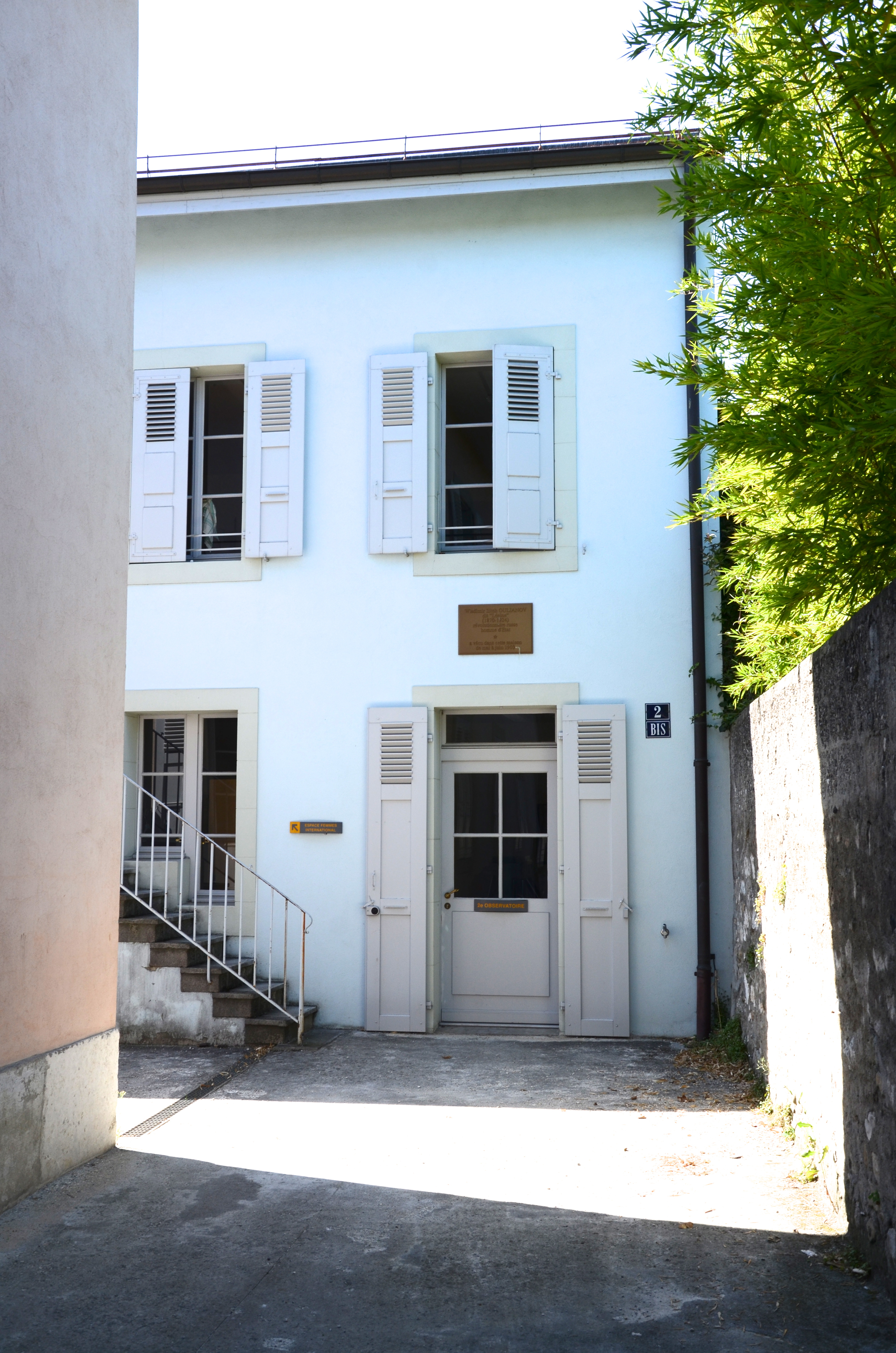 Fondation Archives Vie Privée, 2 rue de la Tannerie à Carouge. Maison dans laquelle Lénine a vécu de mai à juin 1903